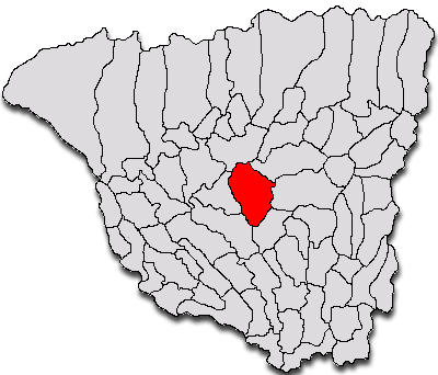 Categorie:Hărţi ale judeţului Gorj